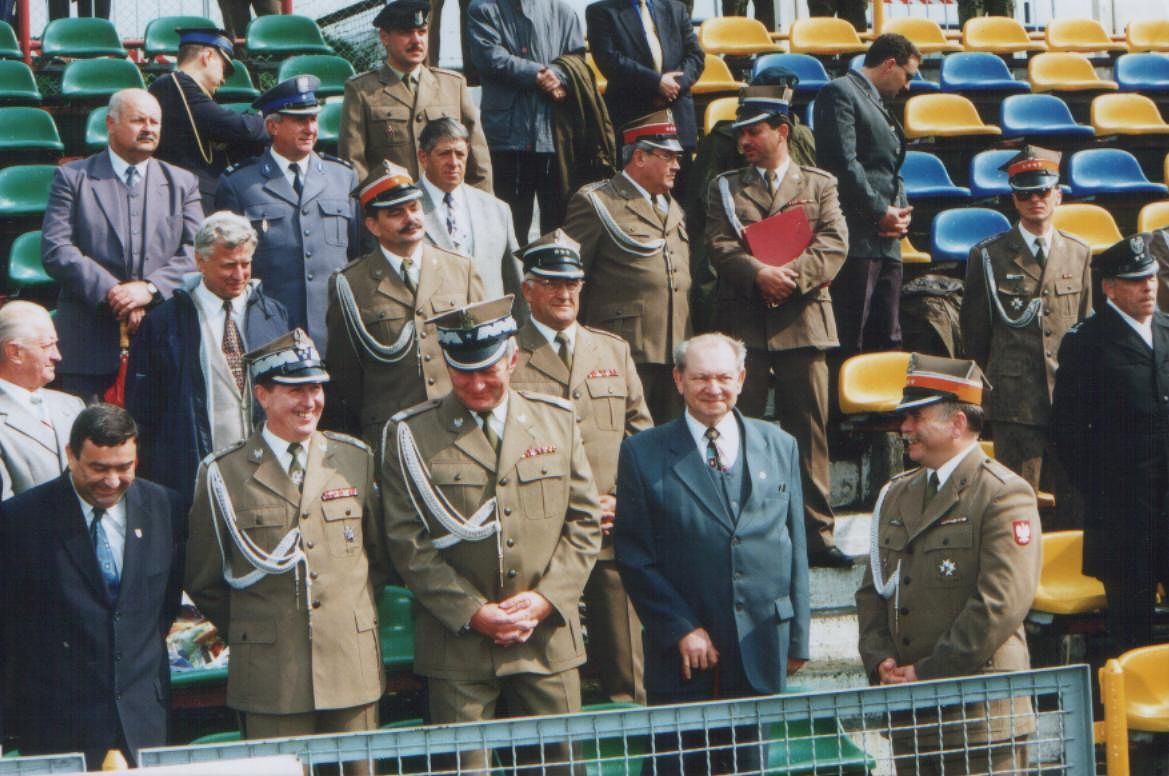 Stargard Szczeciński. Uroczystość wojskowa w 6BKPanc